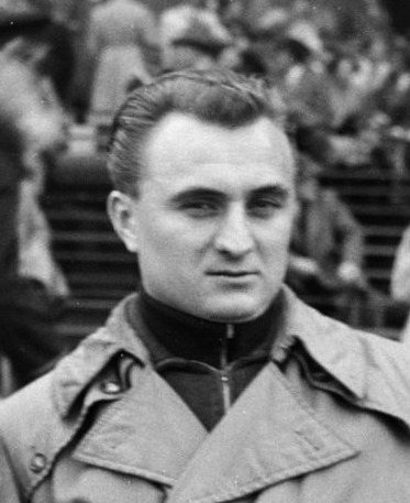 Fifa Elftal, rechts Posipal (Duitsland), links Beara (Joegoslavië). Betreft demonstratiewedstrijd van Fifa-elftal tegen CF Barcelona in Olympisch stadion op 30 september 1953